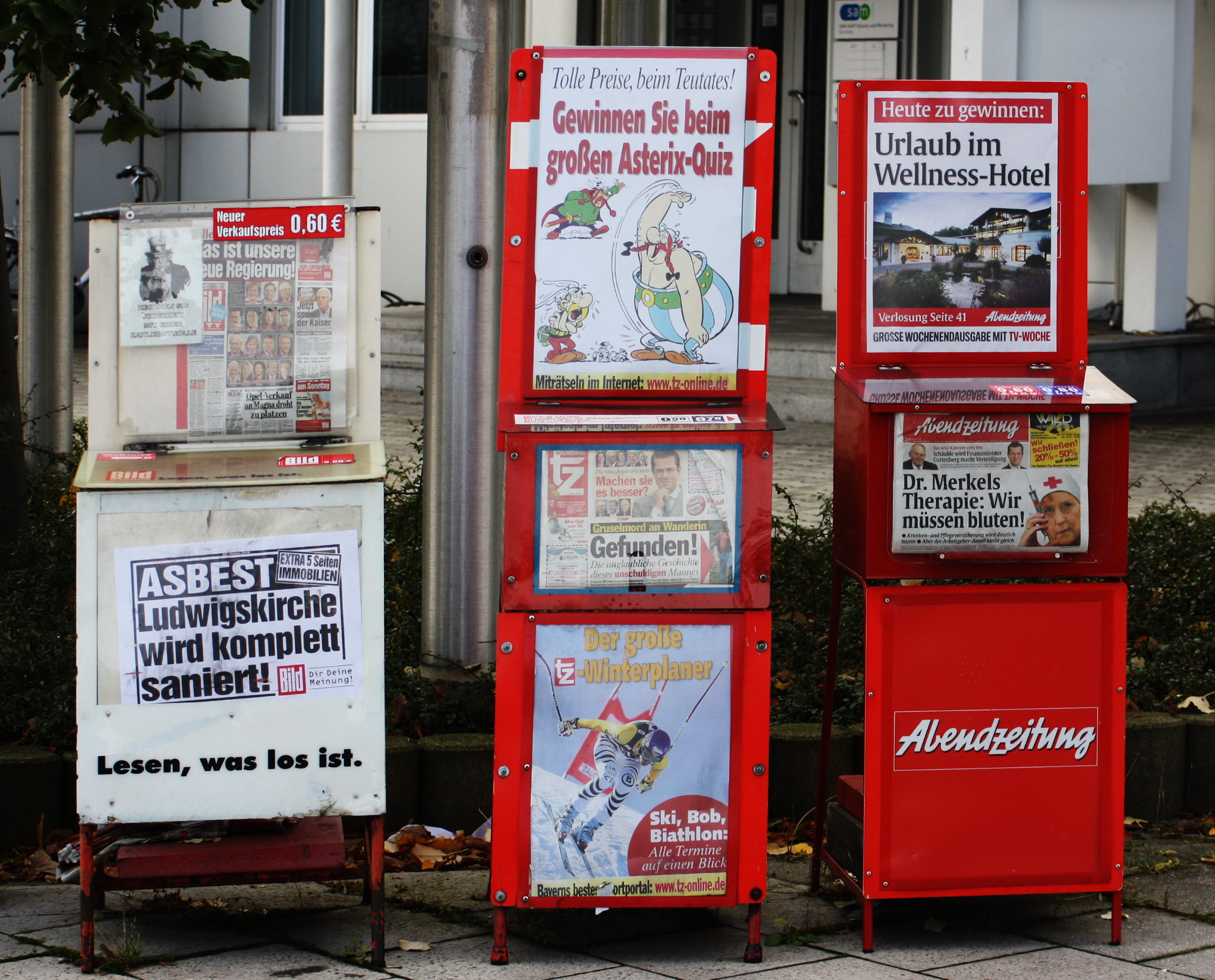 Zeitungsautomaten in München